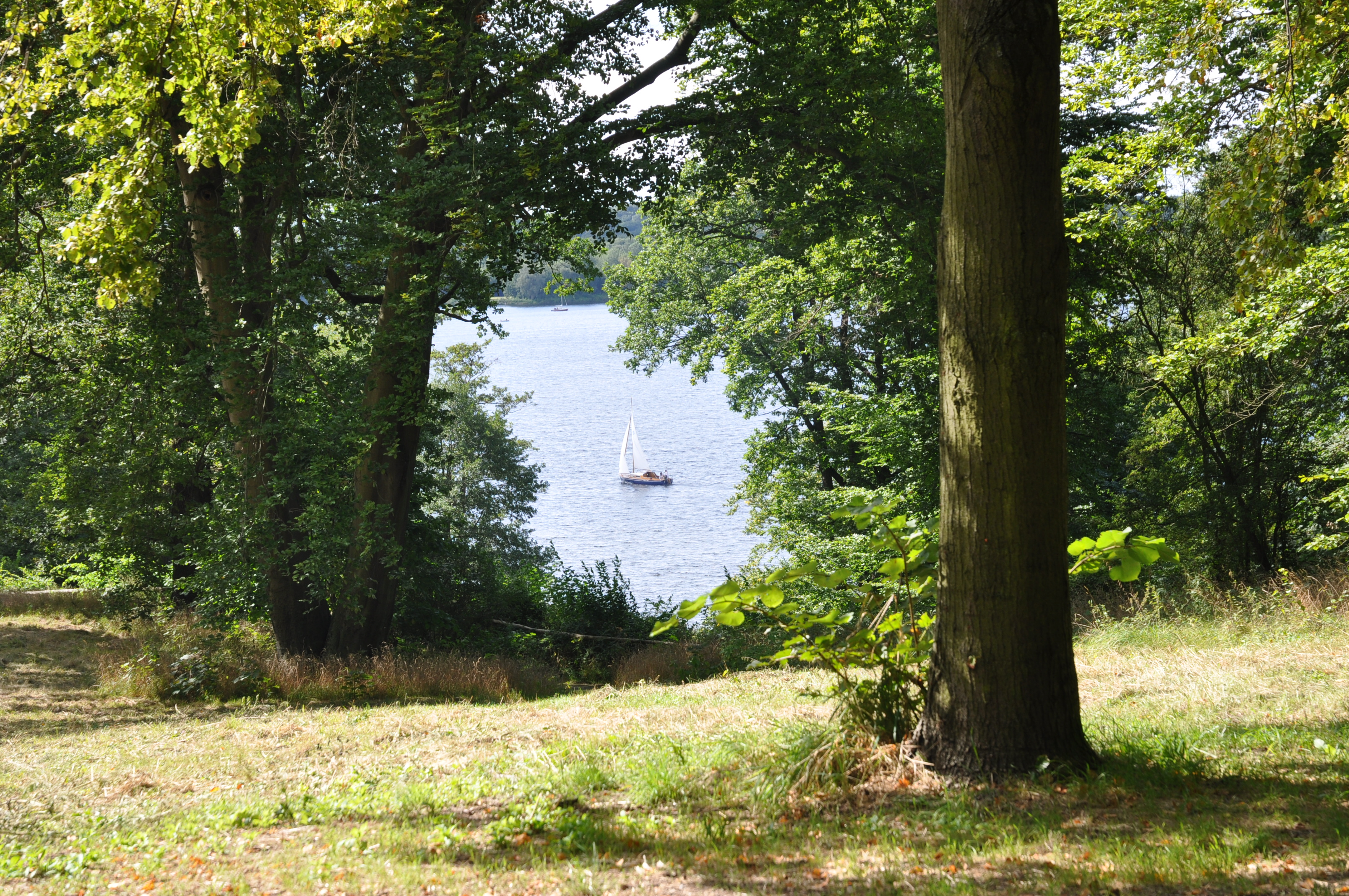 Park Klein Glienicke:Blick vom Zeltenplatz auf den Jungfernsee, 2012